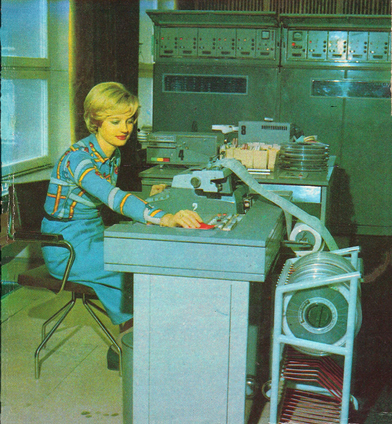 Komputer Odra 1304